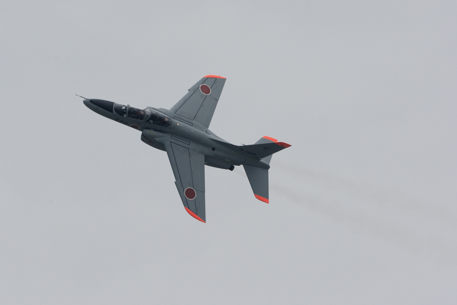 航空自衛隊松島基地 第303飛行隊の、T-4 練習機